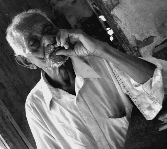 En Oaxaca se pueden encontrar poblaciones originarias de África, sobre todo en la costa